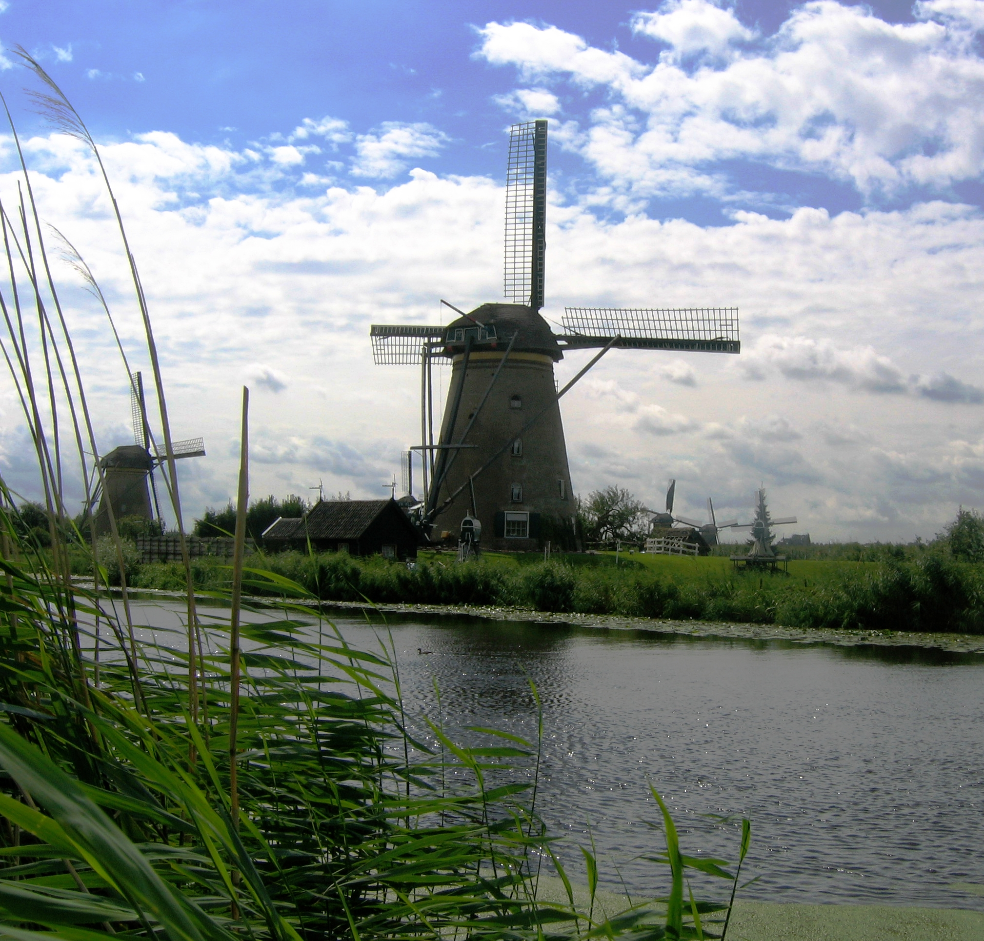 Kinderdijk